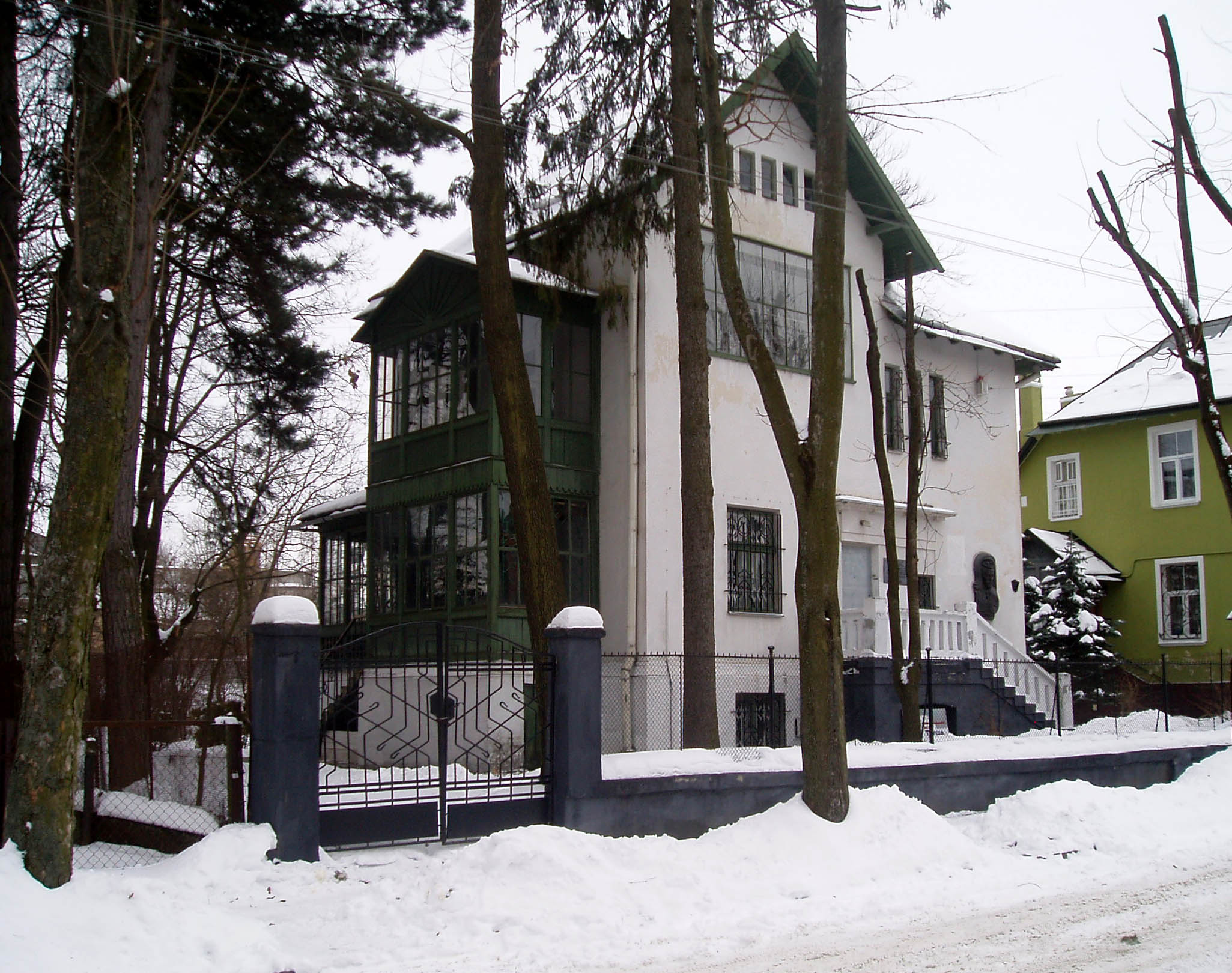 Будинок № 28 на вулиці Івана Труша. Нині - Художньо-меморіальний музей Івана Труша